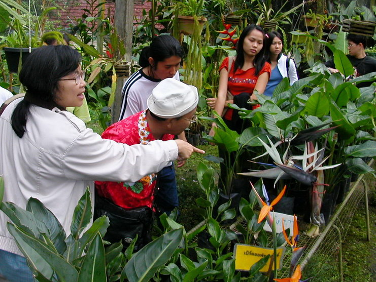 การเรียนการสอนของภาควิชาพฤกษศาสตร์ คณะวิทยาศาสตร์ มหาวิทยาลัยมหิดล